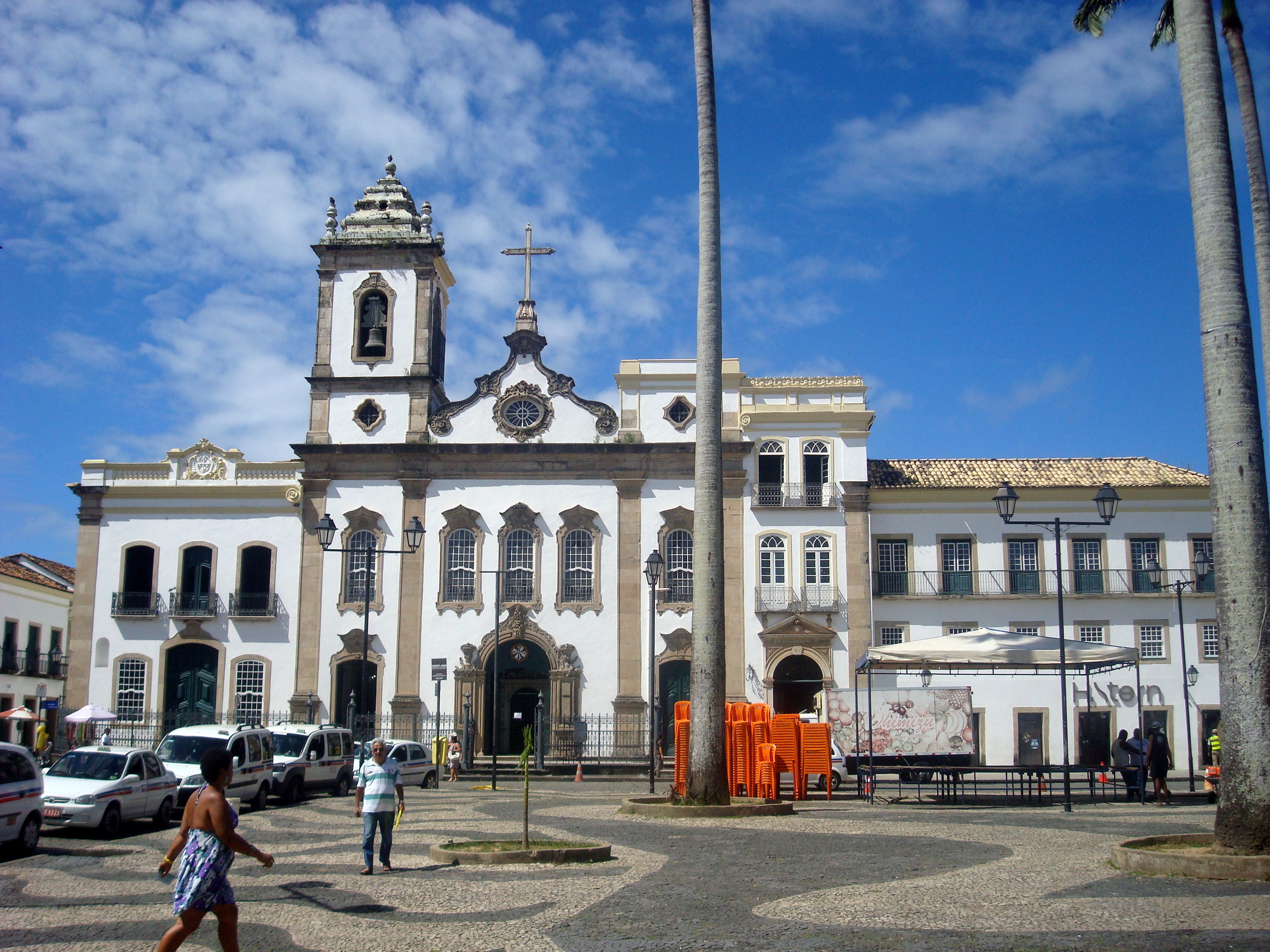 Igreja e Casa da Ordem Terceira de São Domingos